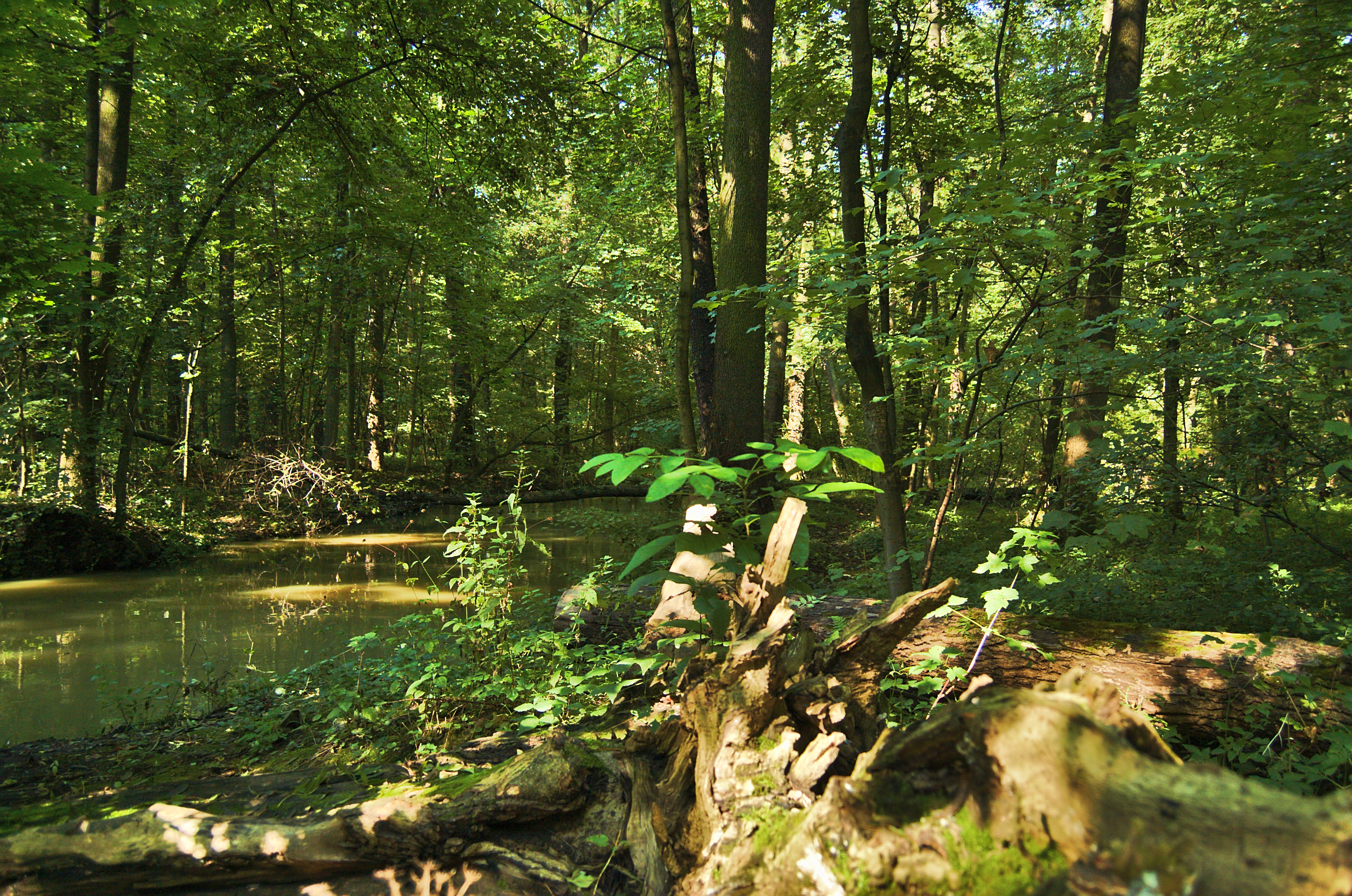 Národní přírodní rezervace Žebračka, okres Přerov